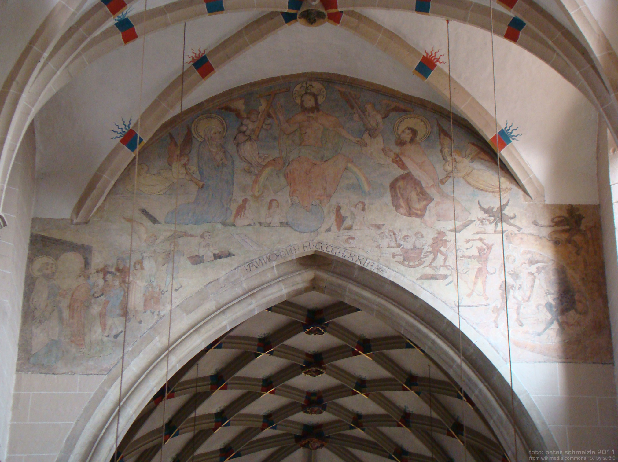 Wandmalerei über dem Triumphbogen zum Chor der Bartholomäuskirche in Markgröningen. Motiv: Jüngstes Gericht. Datierung am Triumphbogen: 1472